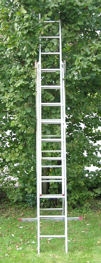 ladder